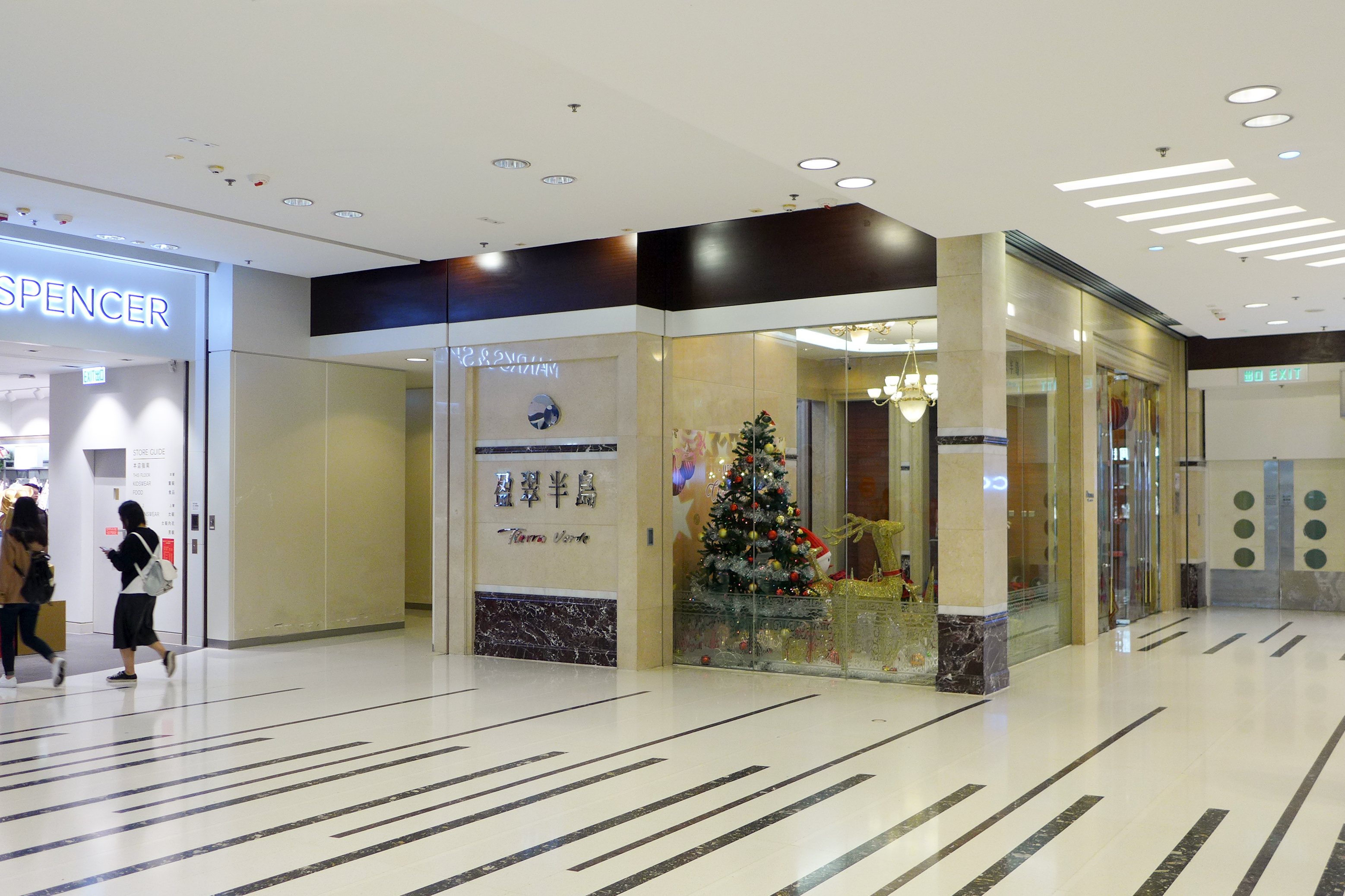 Tierra Verde Entrance Lobby